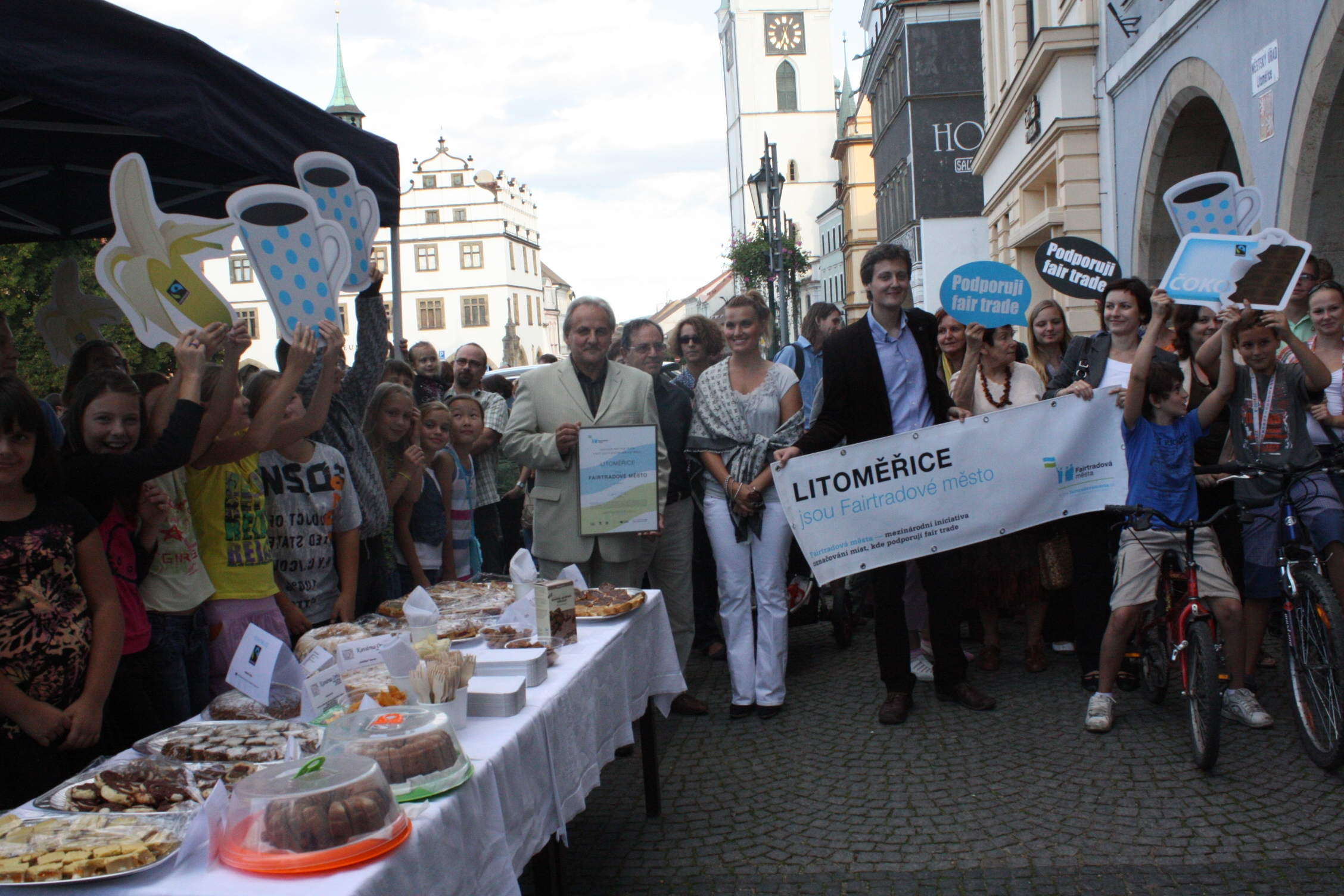 Fotografie z předávání statusu Fairtradové město Litoměřicím dne 14. 9. 2011